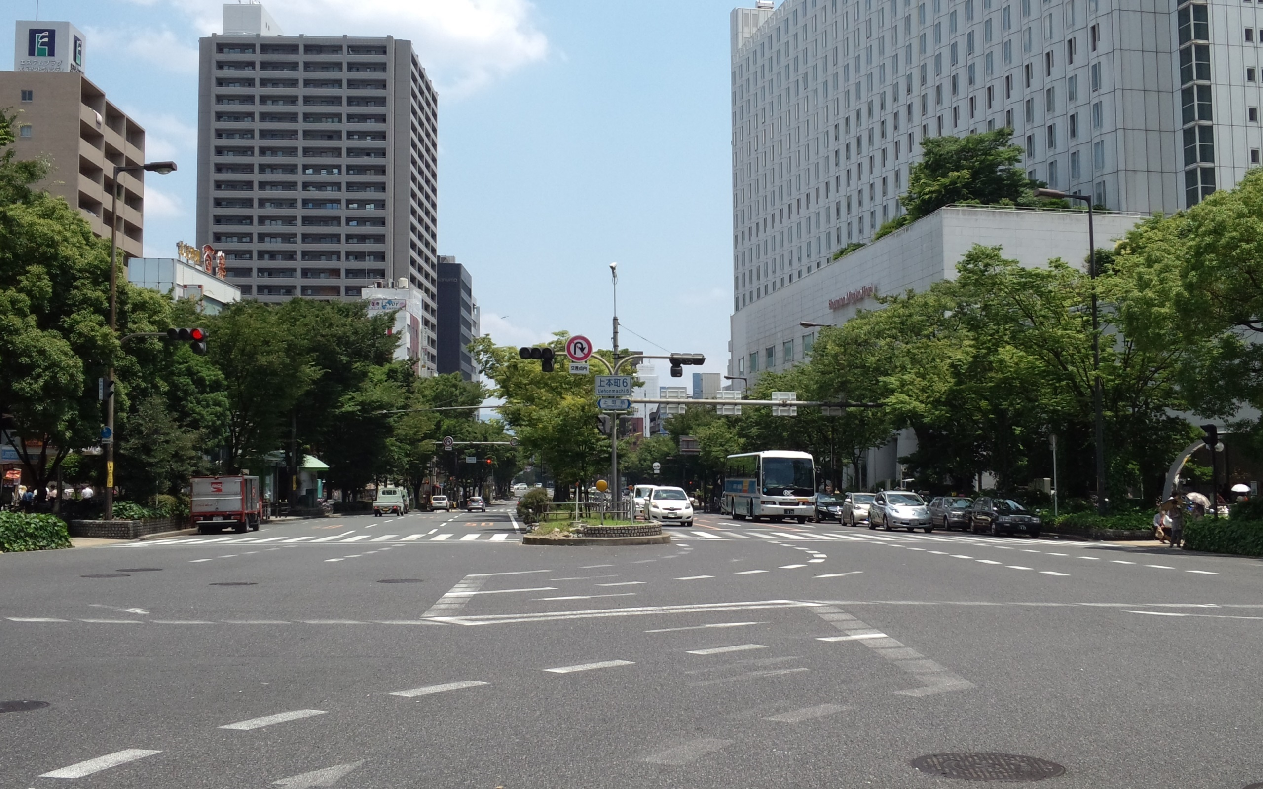 千日前通・上本町六交差点